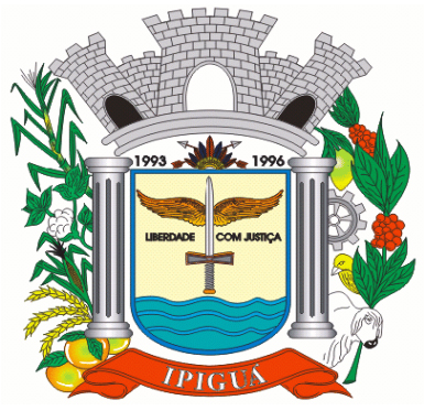 Brasão da cidade de Ipiguá, SP